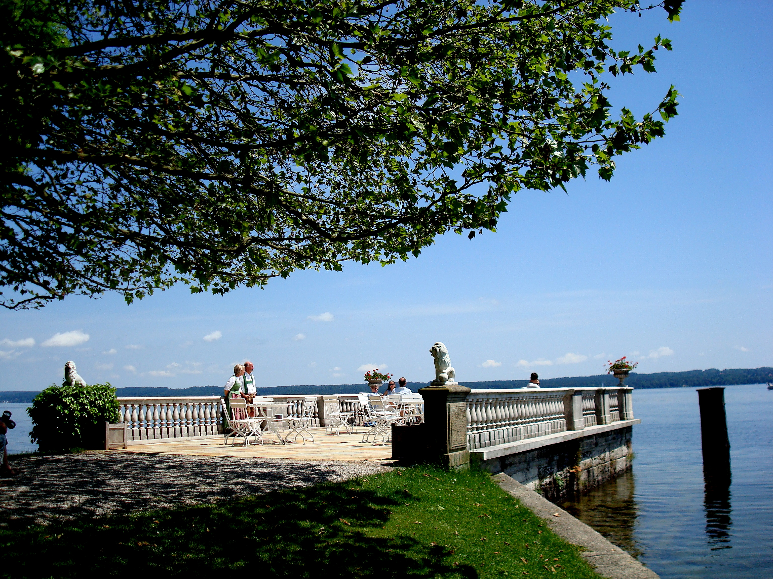 Tutzing, Schloss Tutzing, Schlosspark. Seeterrasse aus der Zeit um 1870.